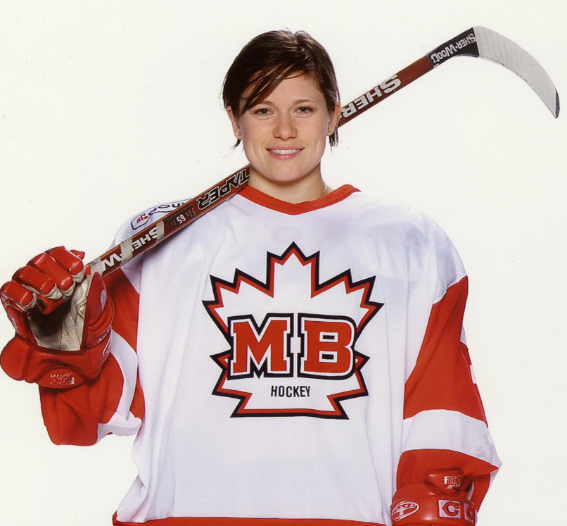 Porträtt M/B Hockey 2005/2006